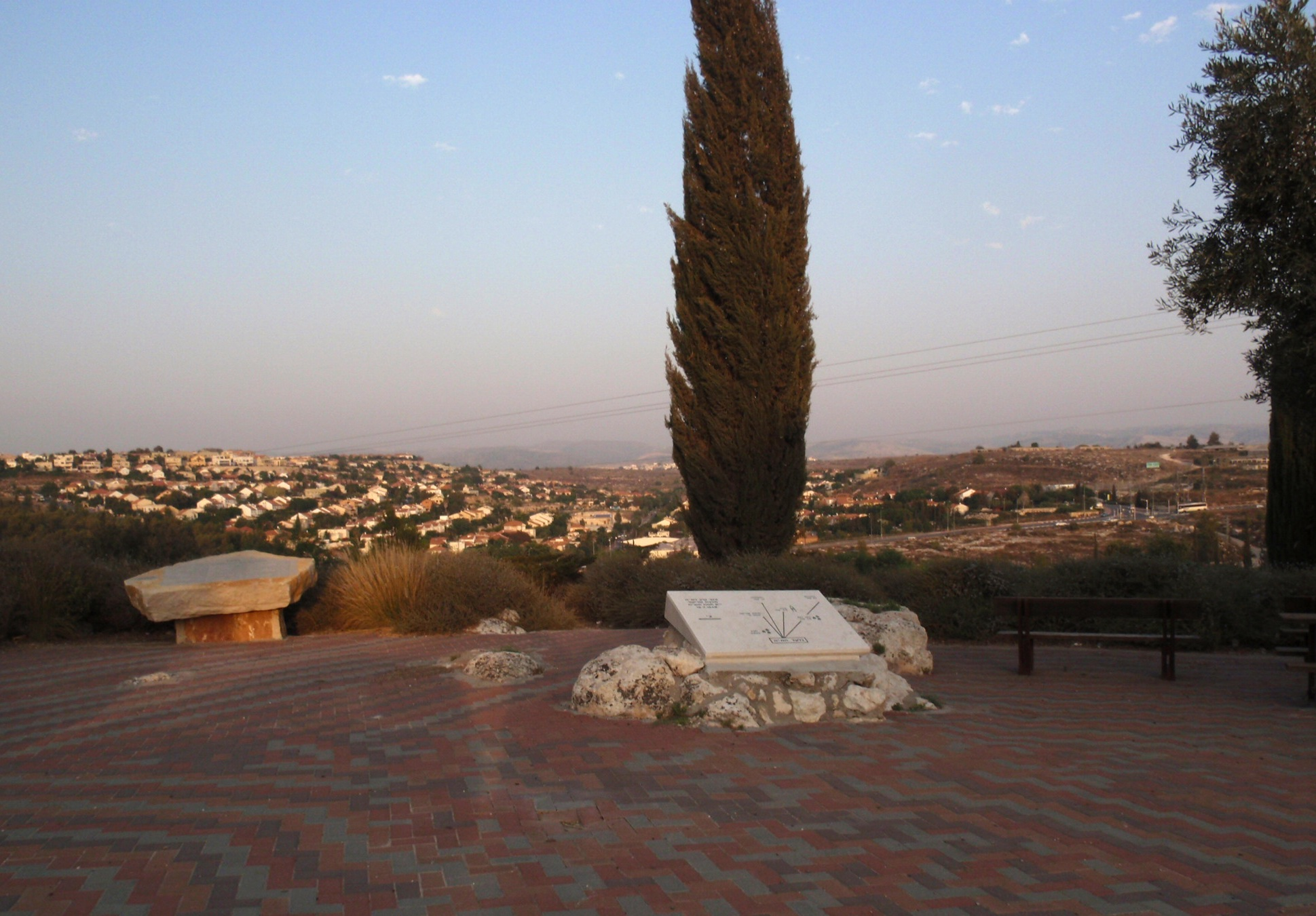 שילת גלעד המ"ה